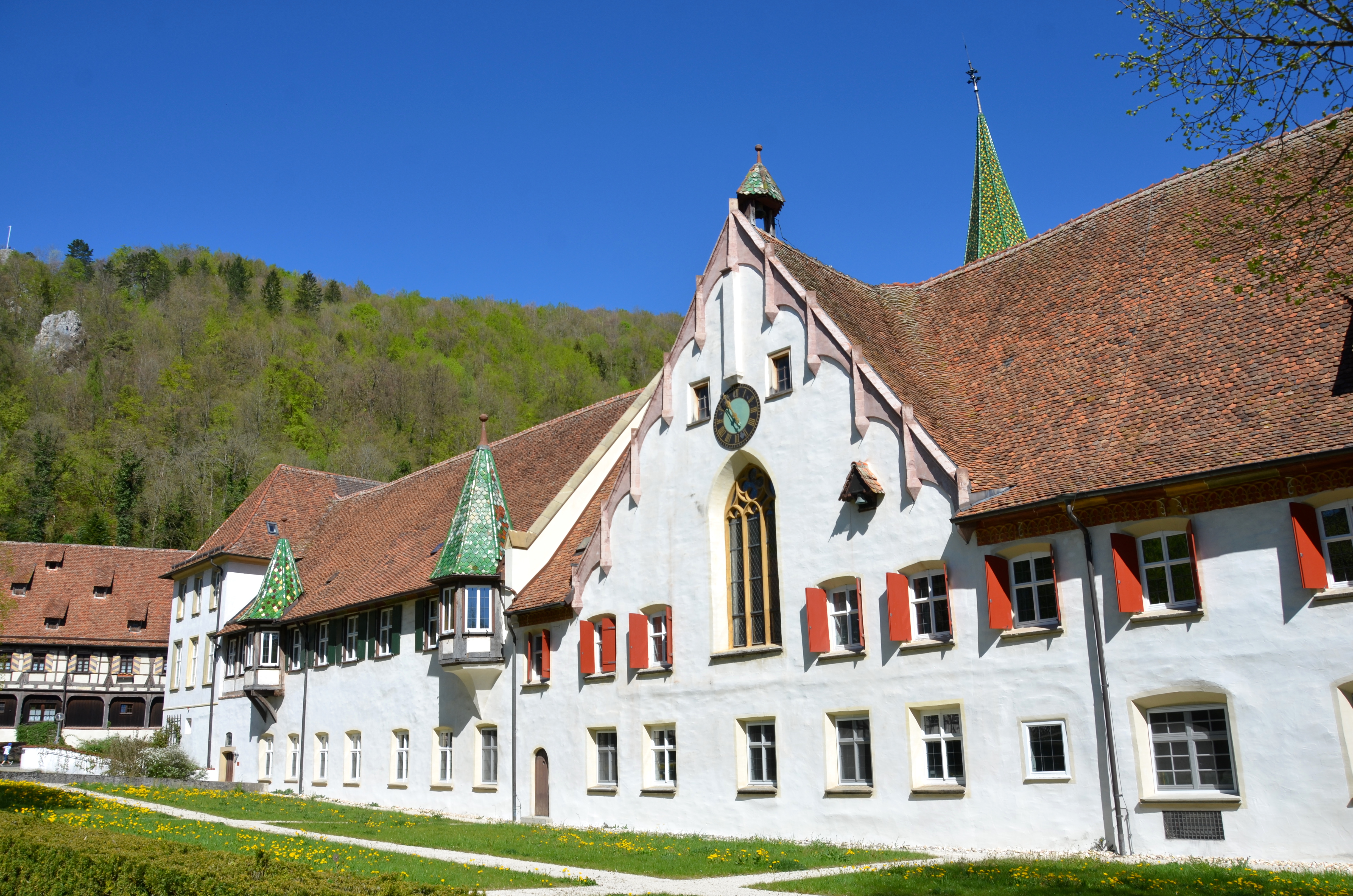 Kloster Blaubeuren, Evangelisches Seminar, Gymnasium mit Internat